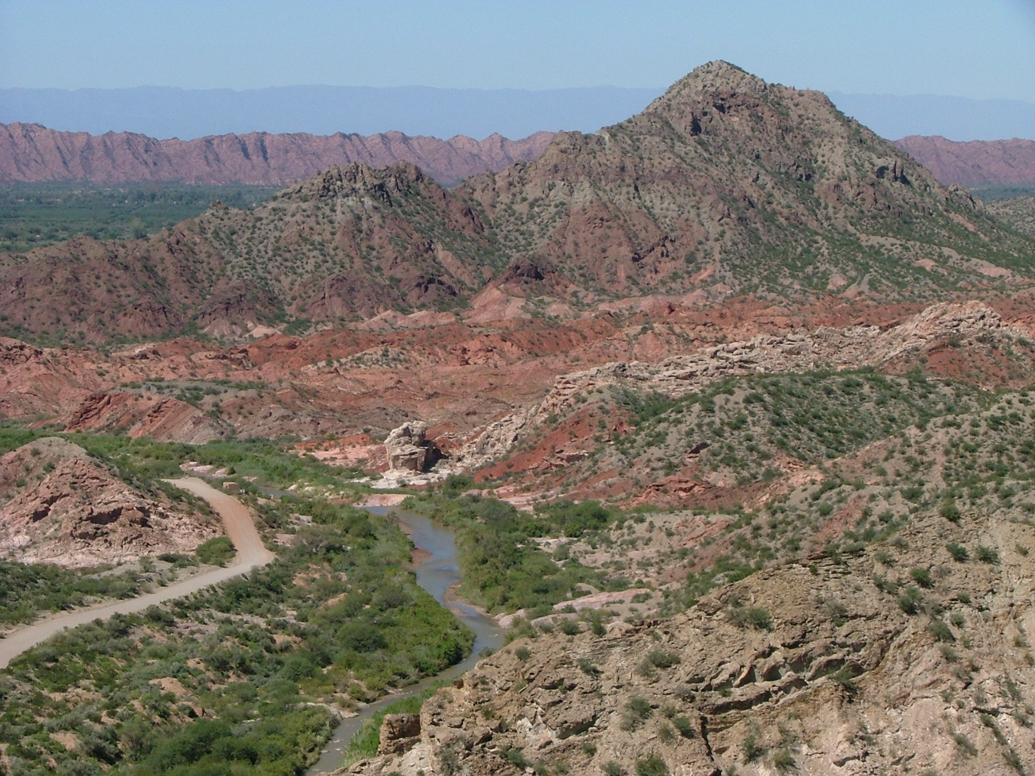 Cuesta de Huaco, Departamento Jáchal, provincia de San Juan, Argentina